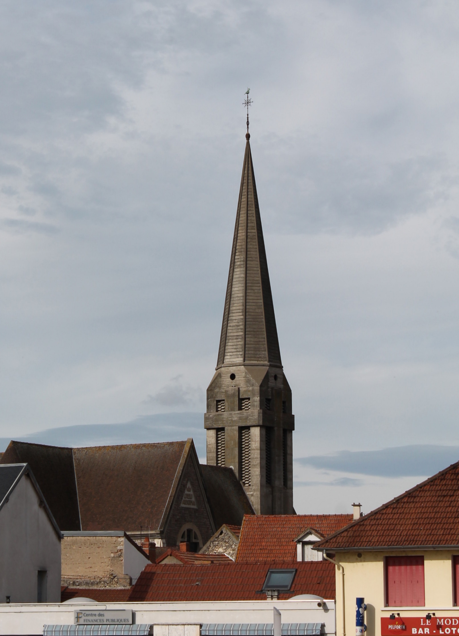 Le clocher